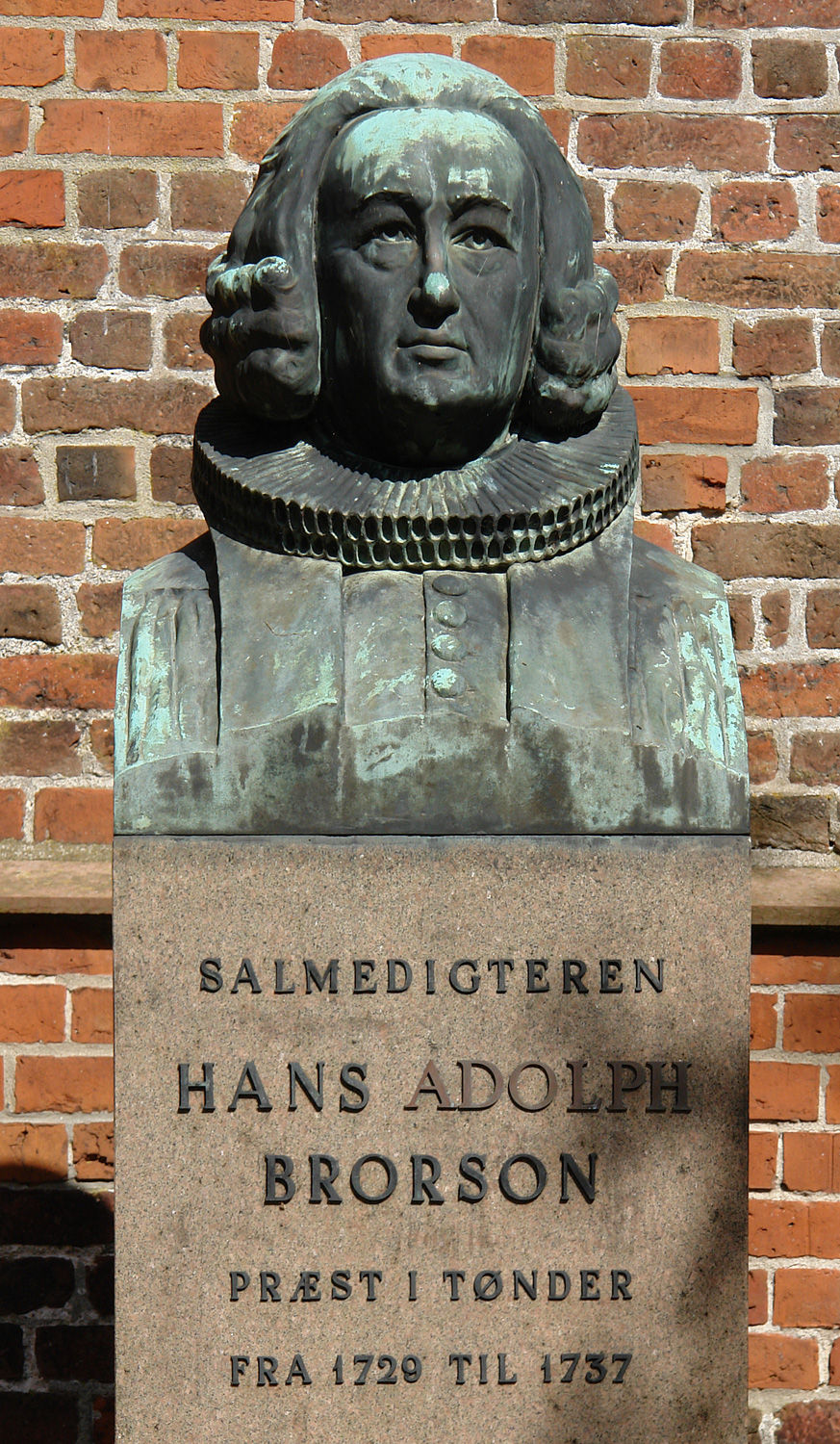 Hans Adolph Brorson. Dänischer Bischof und einer der größten Psalmendichter Skandinaviens. Büste neben der Christuskirche in Tondern.